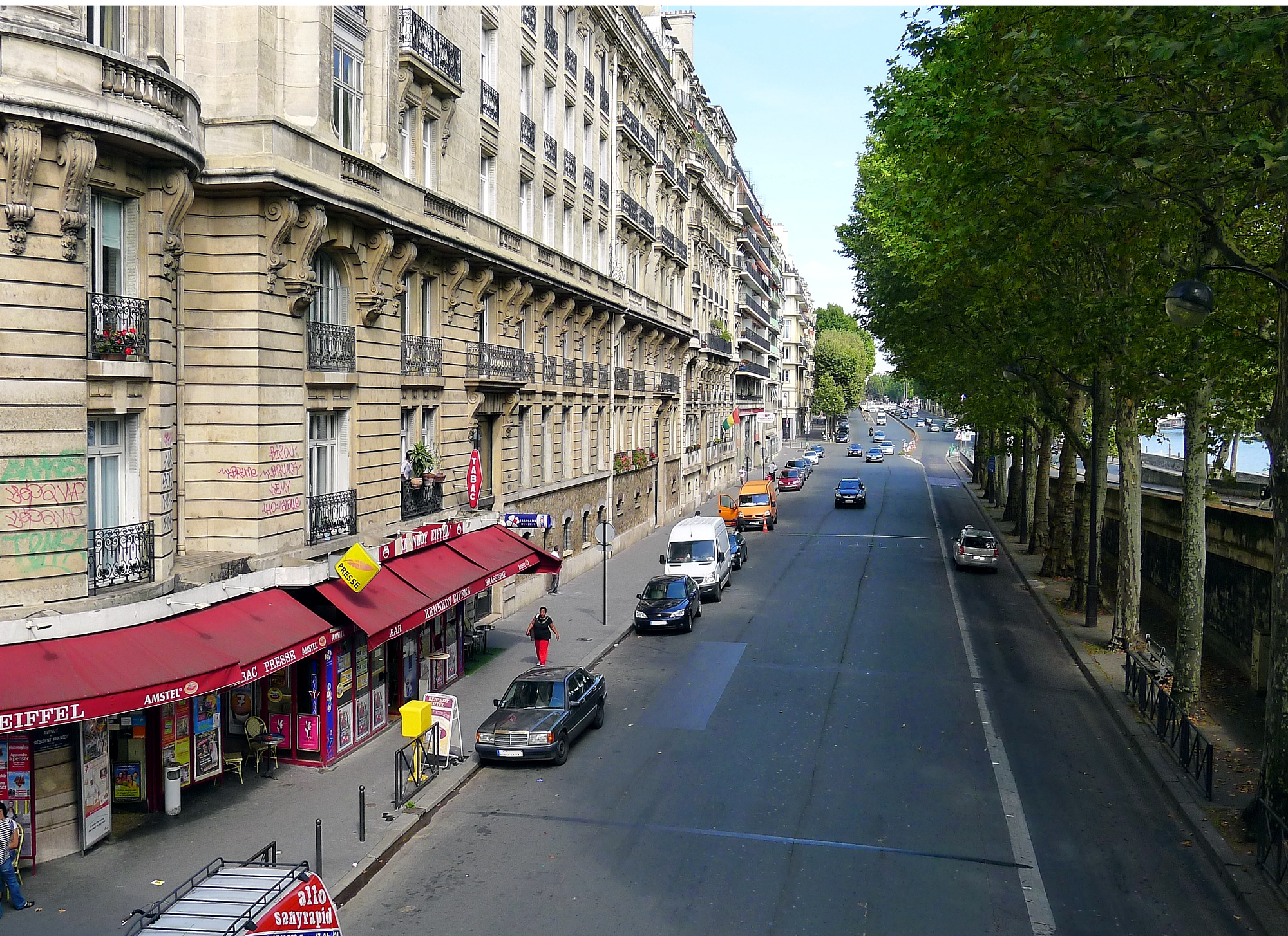 Restaurant bar brasserie tabac Eiffel Kennedy, 16 Avenue du Président-Kennedy - Paris XVI